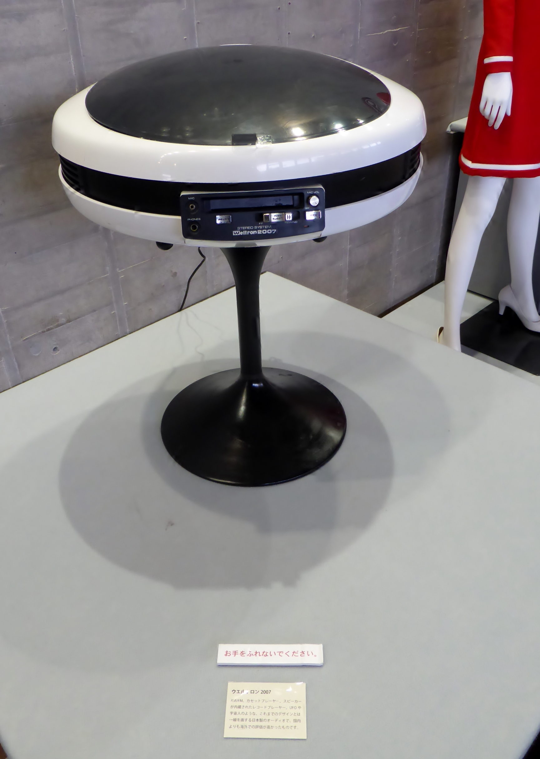 ウェルトロン2007を撮影。